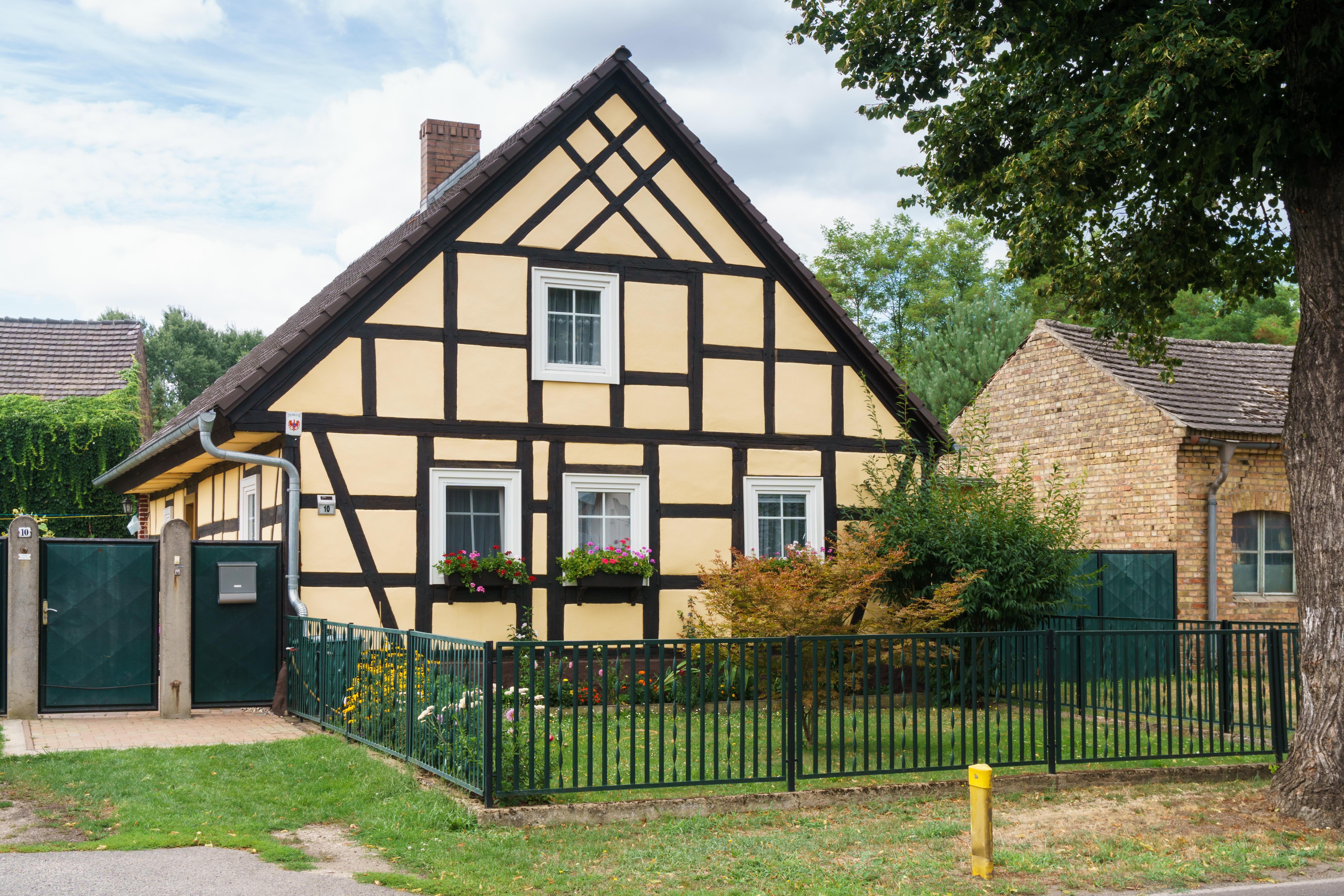 Denkmalgeschütztes Wohnhaus, Berliner Straße 10 in Lübbenau/Spreewald OT Ragow